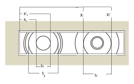 Exemple de cliché de Debye-Scherrer